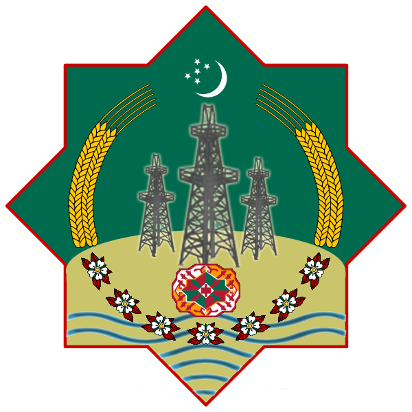 Герб Туркменабада